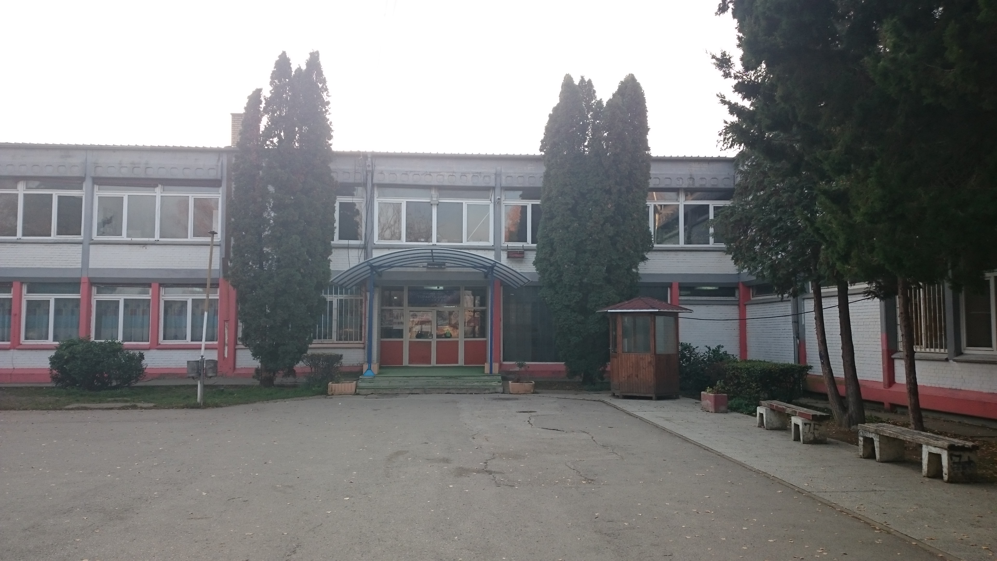 Српски (ћирилица): Двориште и улаз у школу